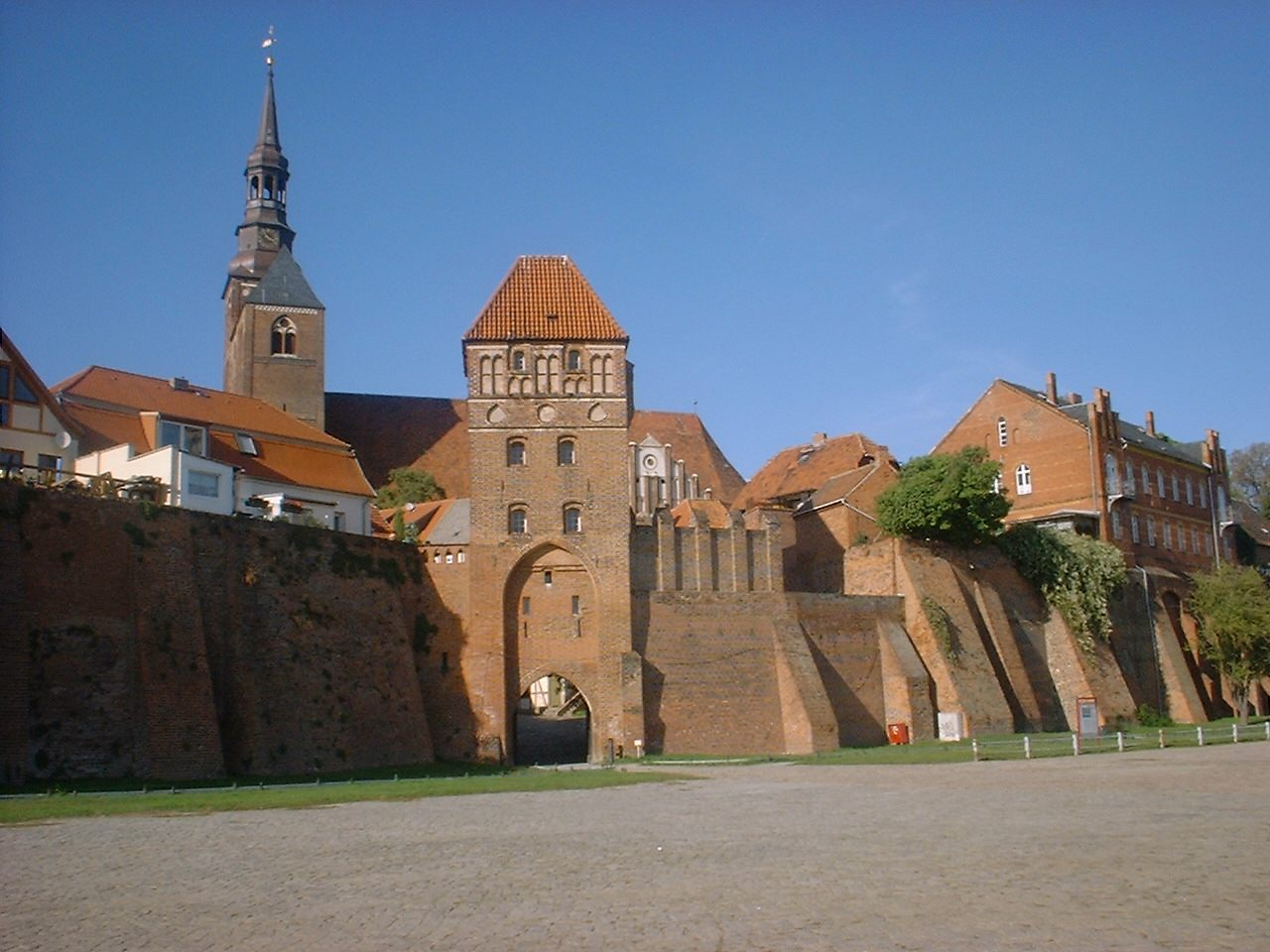 Elbtor „Rossfurt“ und St. Stephanskirche in Tangermünde in Sachsen-Anhalt, Deutschland